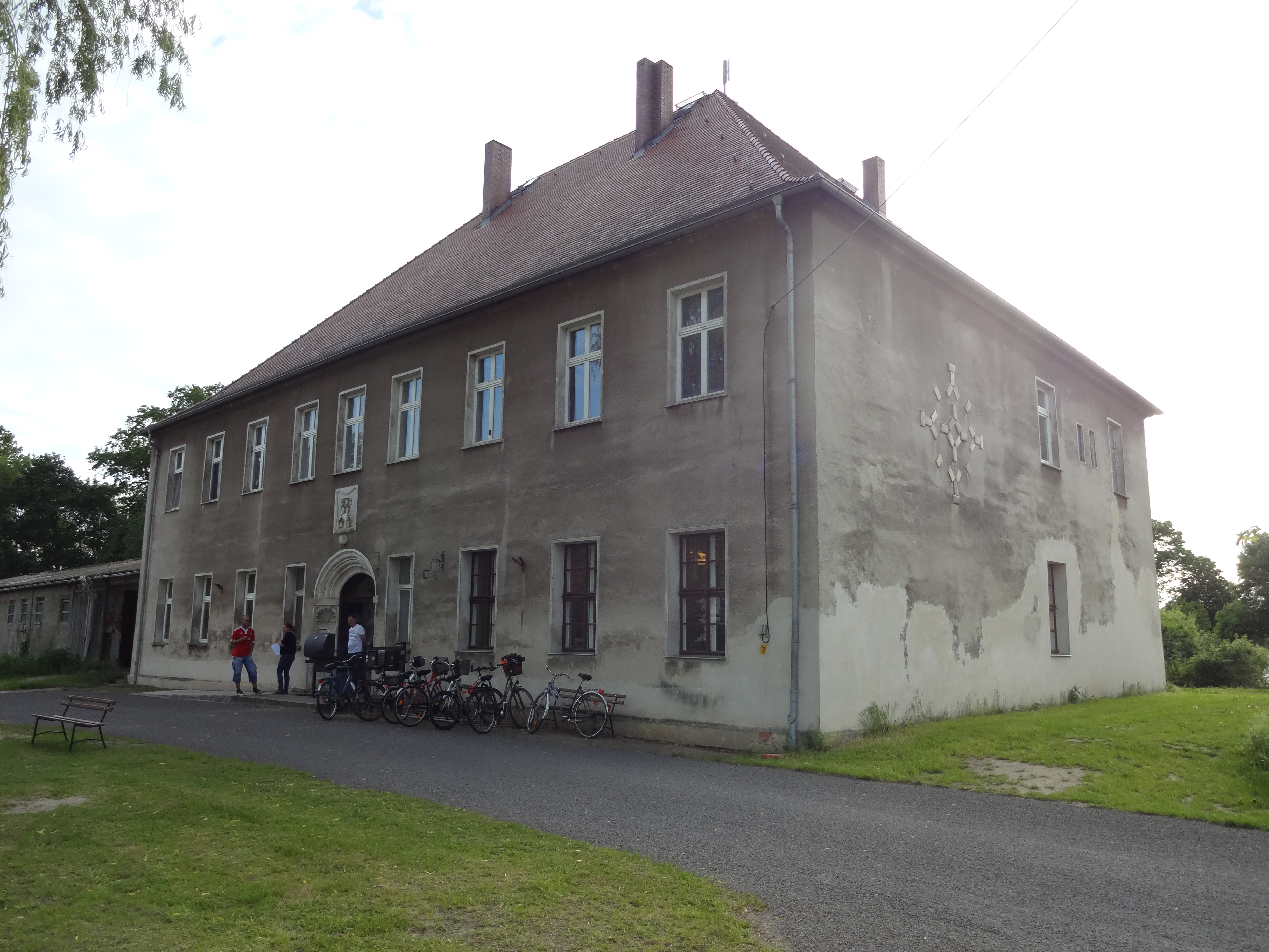 denkmalgeschütztes Gutshaus Kümmritz